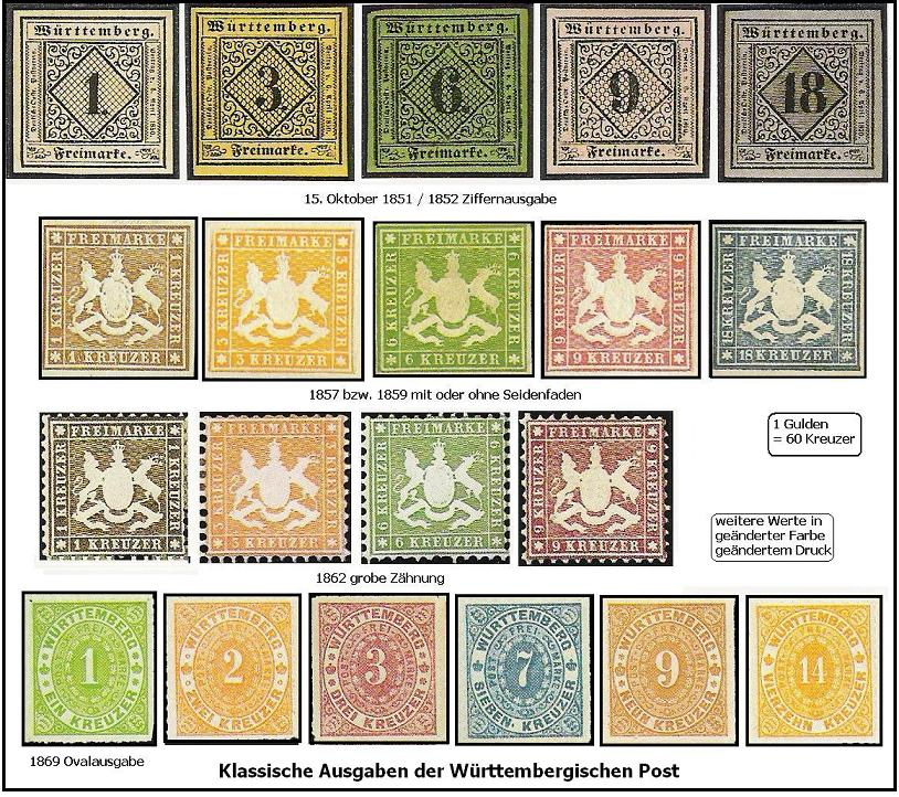 Württemberger Postwertzeichen in Kreuzer-Währung gescannt W.Steven 16:23, 15. Jan. 2007 (CET) 2007